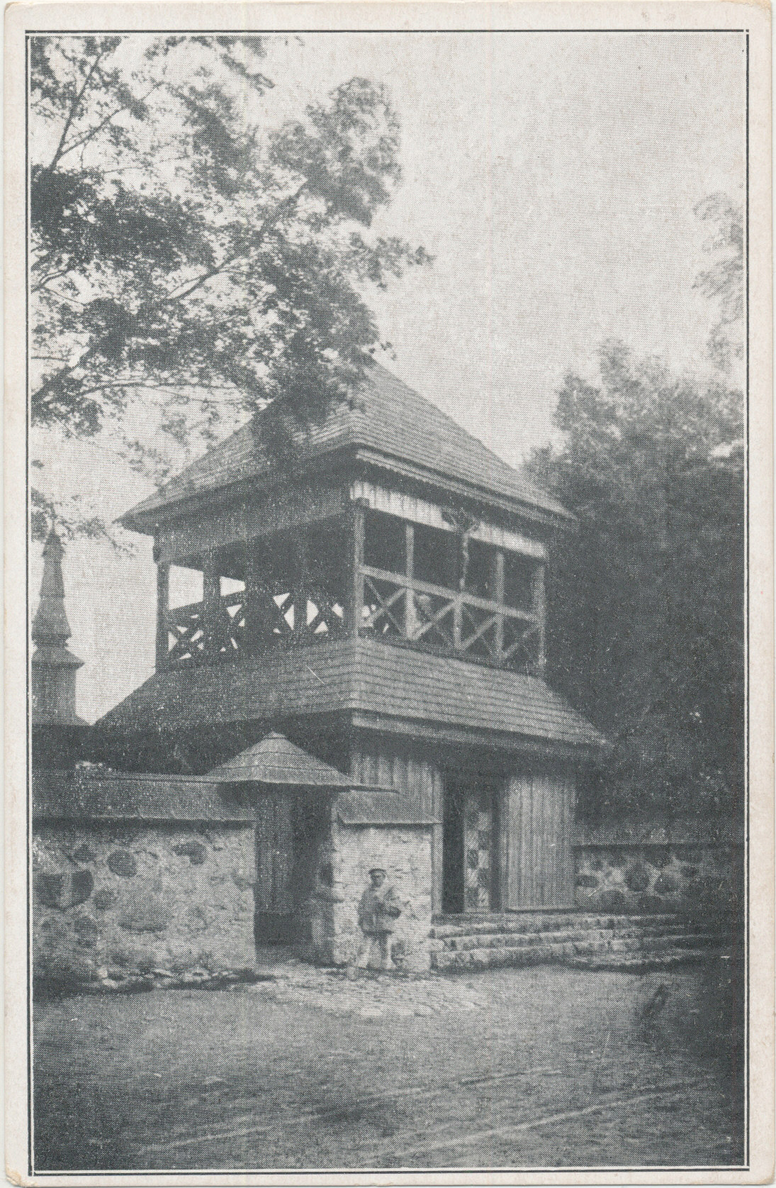 Беларуская (тарашкевіца): Камень (Kamień). Званіца пры касьцёле